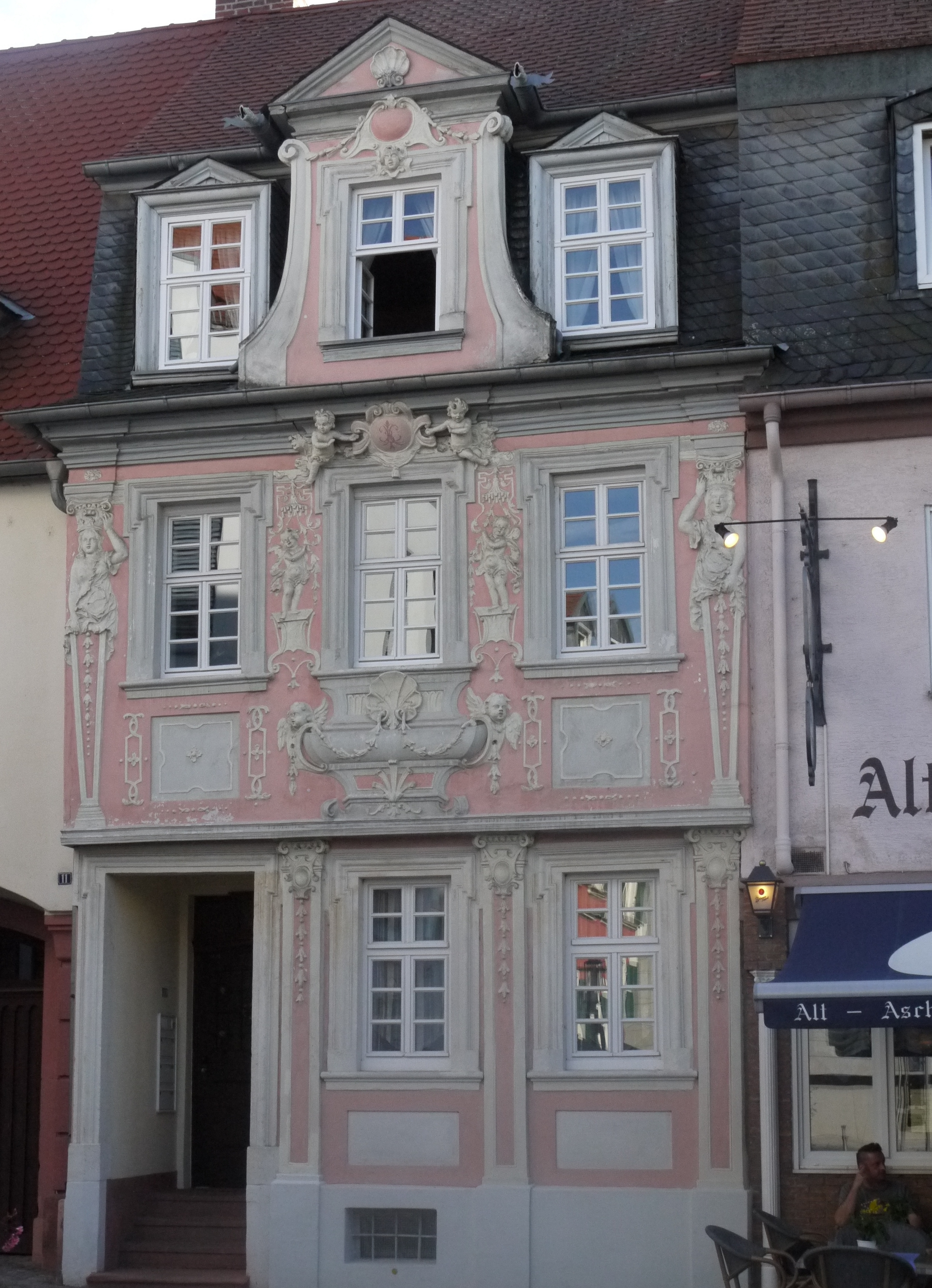 Strickergasse 11, (Bechtholdhaus) denkmalgeschütztes Gebäude in Aschaffenburg